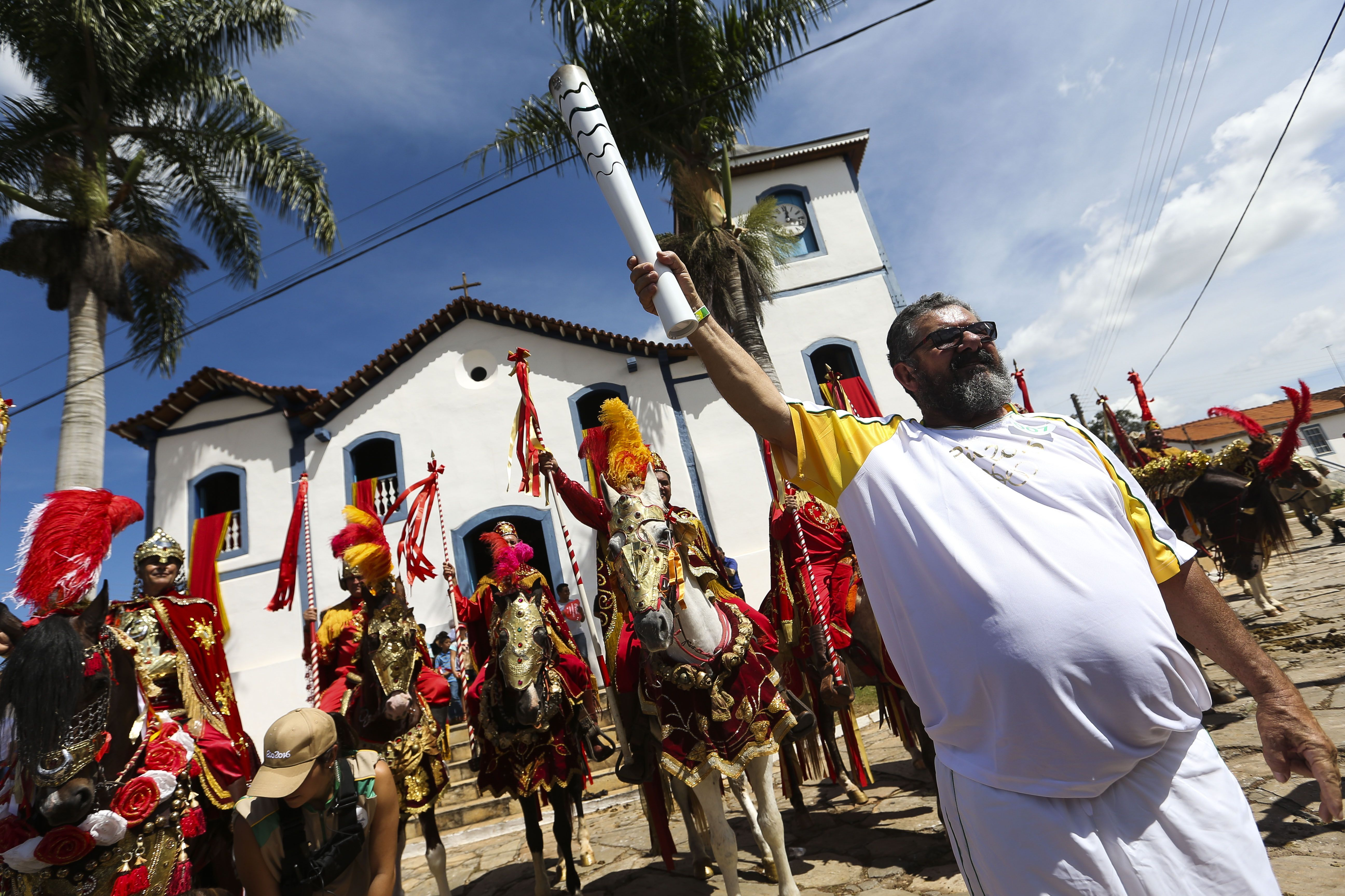 Corumbá (GO) - Moradores e os tradicionais cavaleiros da Cavalhada de Corumbá de Goiás fazem festa para a passagem da Tocha Olímpica pela cidade